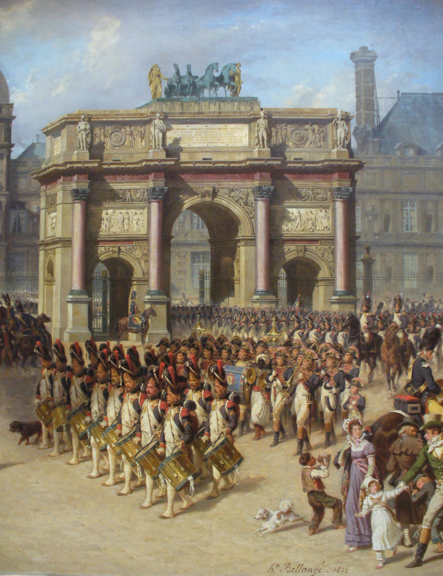 "Un jour de revue sous l'Empire". Tableau d'Hippolyte Bellanger et d'Andrien Dauzatz, 1862. Musée du Louvre.